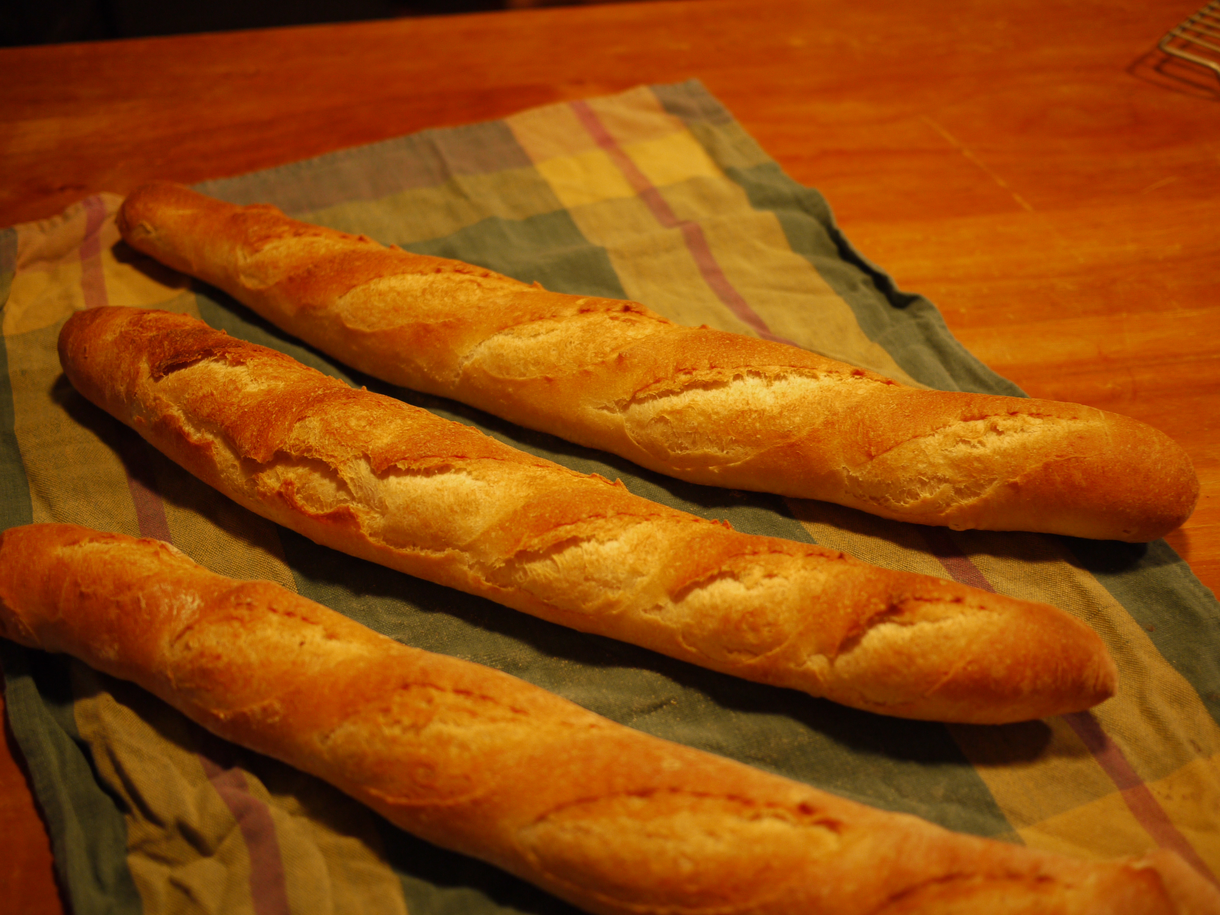 zdjęcia obrazujące 6 rodzajów pieczywa: rogal, chleb ciemny, chałka, bagietka, kajzerka, sucharki English | Polski | +/−